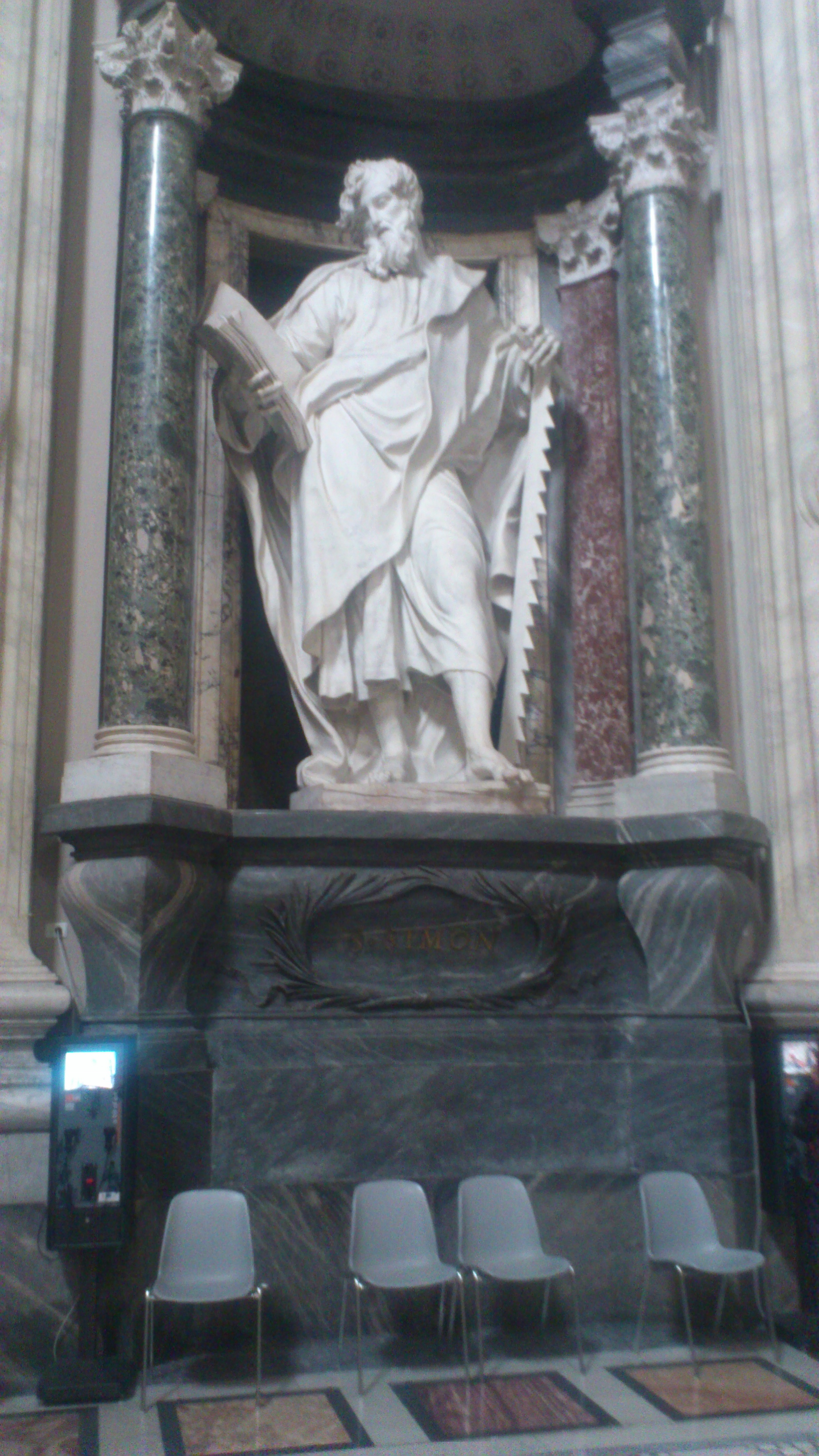 L'apôtre saint Simon dans la basilique de saint Jean de Latran, Rome, Italie